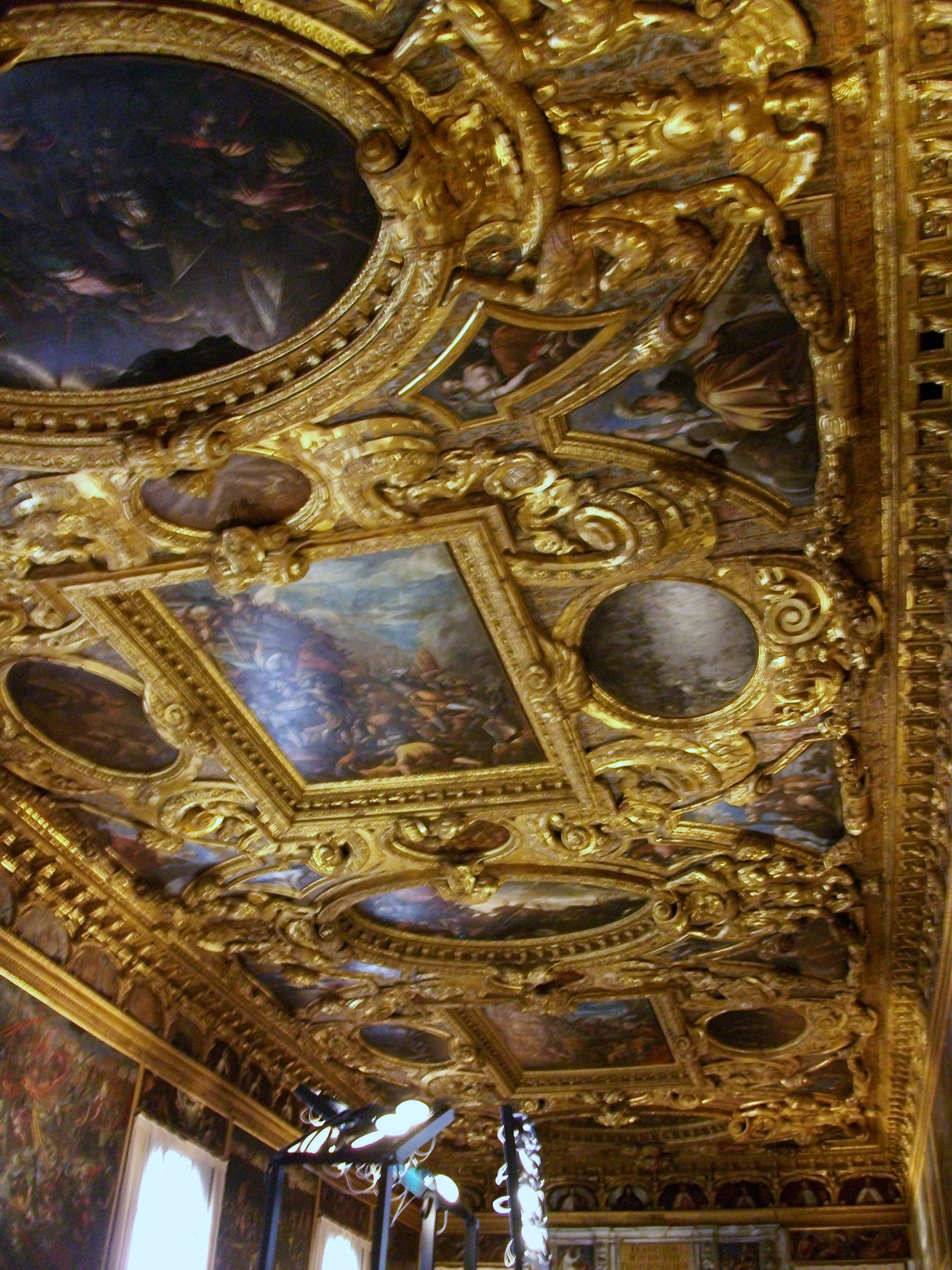 Sala dello Scrutinio - Palau Ducal de Venècia.